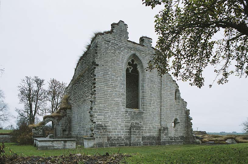 Den västra gaveln. Motiv: Alvastra kloster Nyckelord: Raä-Fastigheter, Riksintressen Kategori: Kloster Den västra gaveln.